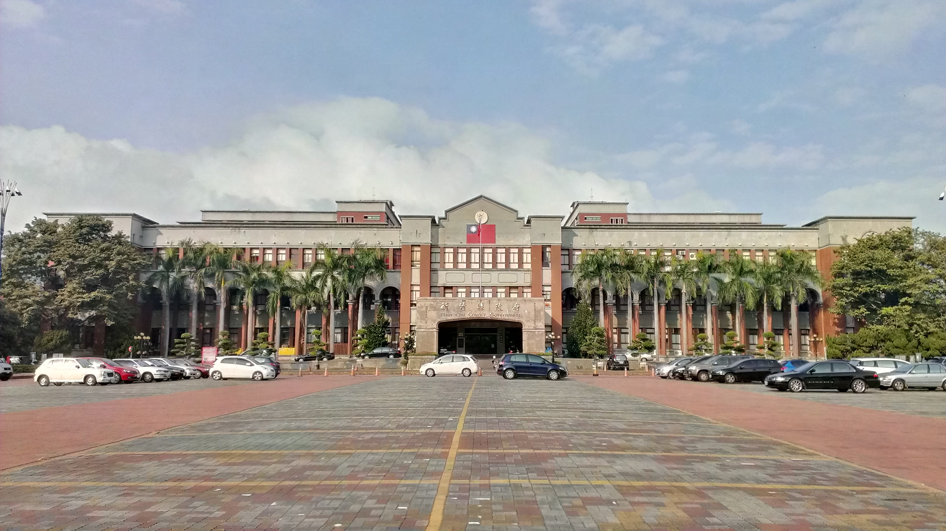 中文（台灣）: 位在新竹縣竹北市縣治特區的新竹縣政府